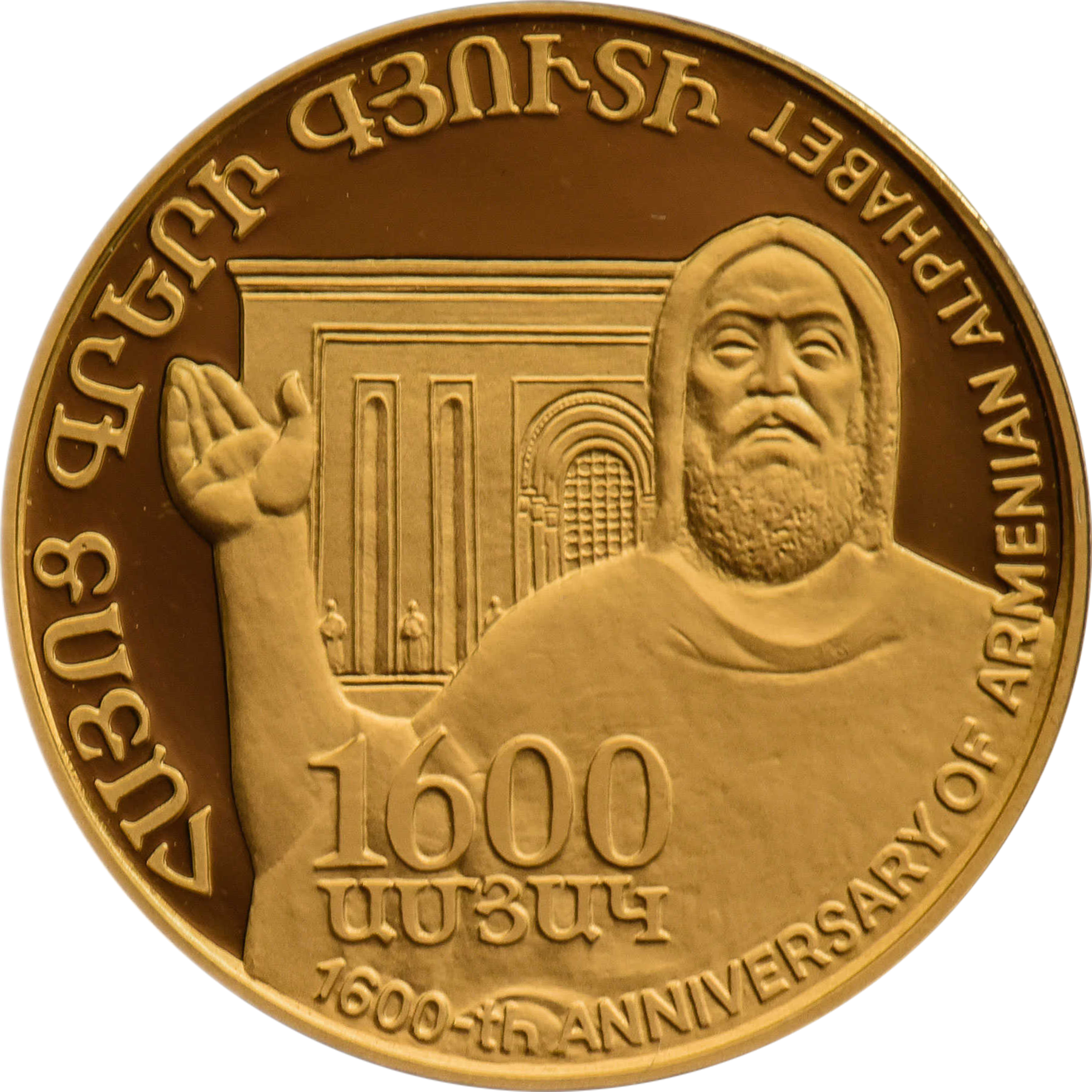 Памятная монета Армении 2002 года "1600-летие армянского алфавита" - 10000 драм - золото 999